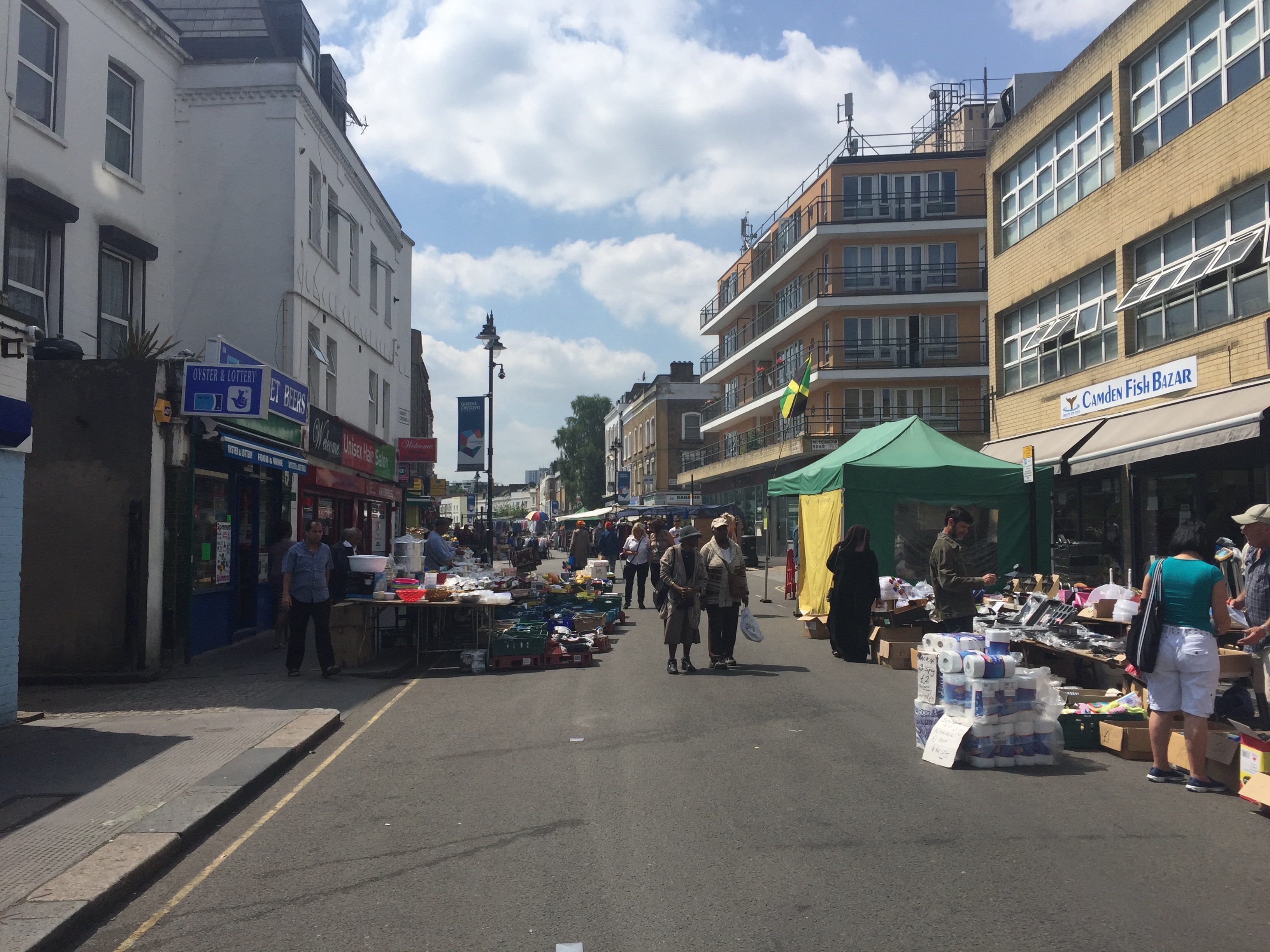 Queen's Crescent Market